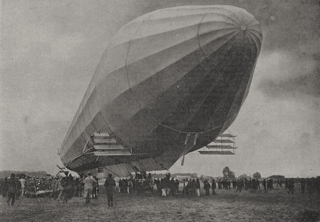 Landung des für den Passagierverkehr bestimmten Luftschiffs "Deutschland" L.Z VII (148 m lang, Durchmesser 14 m) auf der Golzheimer Heide bei Düsseldorf am 22. Juni 1910, veröffentlicht in Rhein und Düssel am 3. Juli 1910